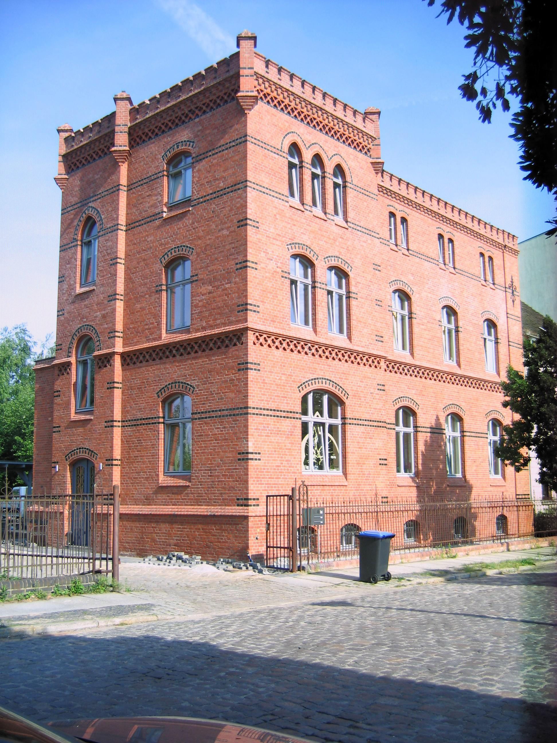 Wernerstraße 46